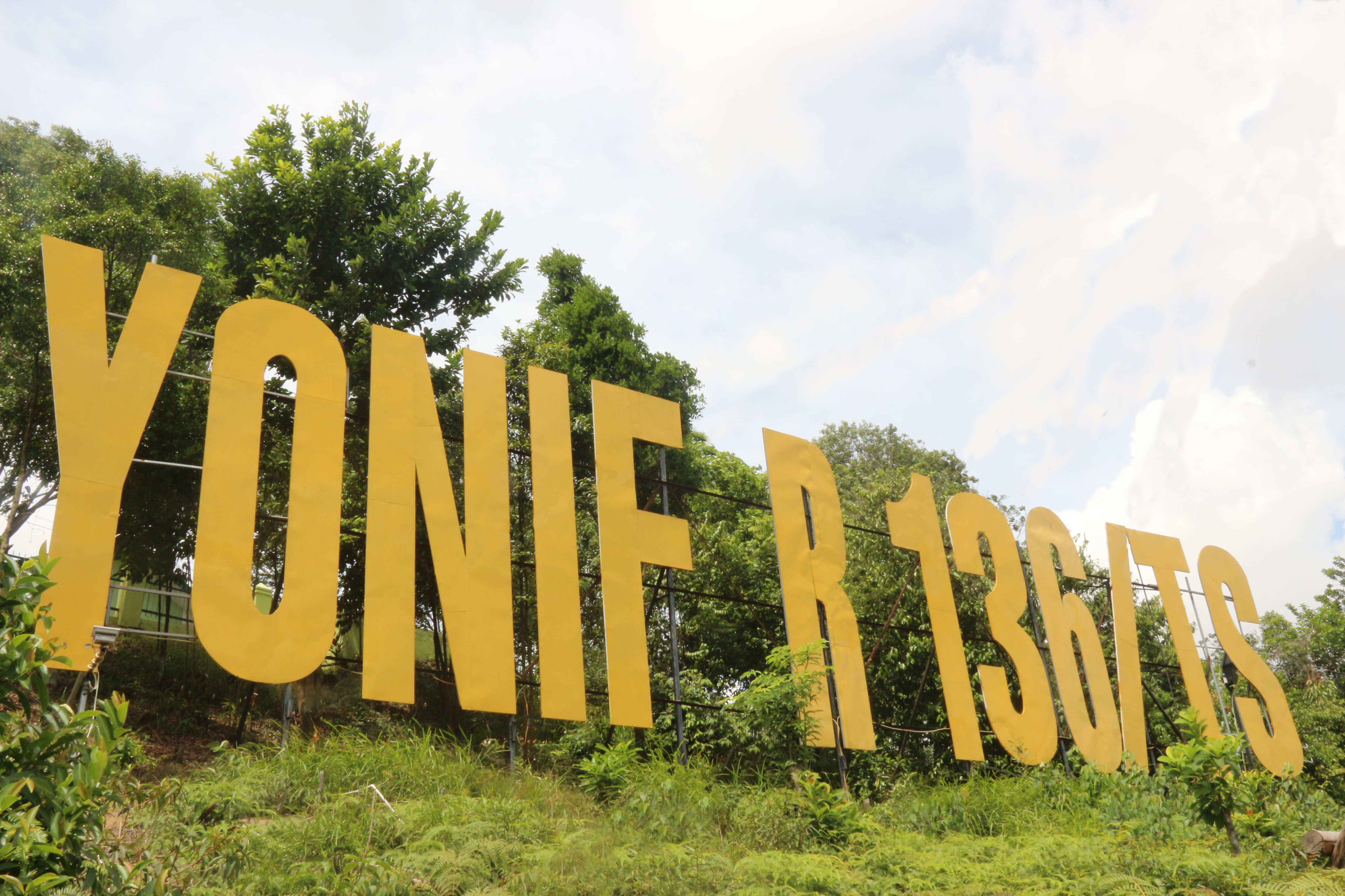 Standing Name Yonif Raider Khusus 136/TS